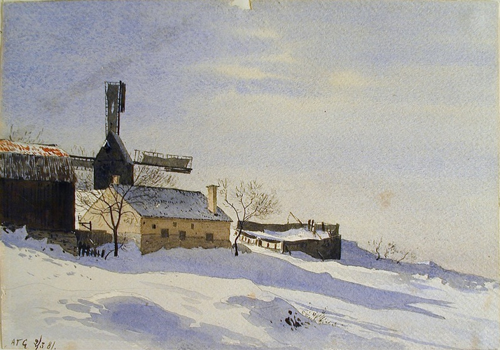 Kvarnen Jan Erss enligt akvarell av Albert Theodor Gellerstedt. Stampkvarn uppförd av t och namngiven efter ägaren Johan Eriksson Rehn på 1600-talet vid nuvarande Rehnsgatan